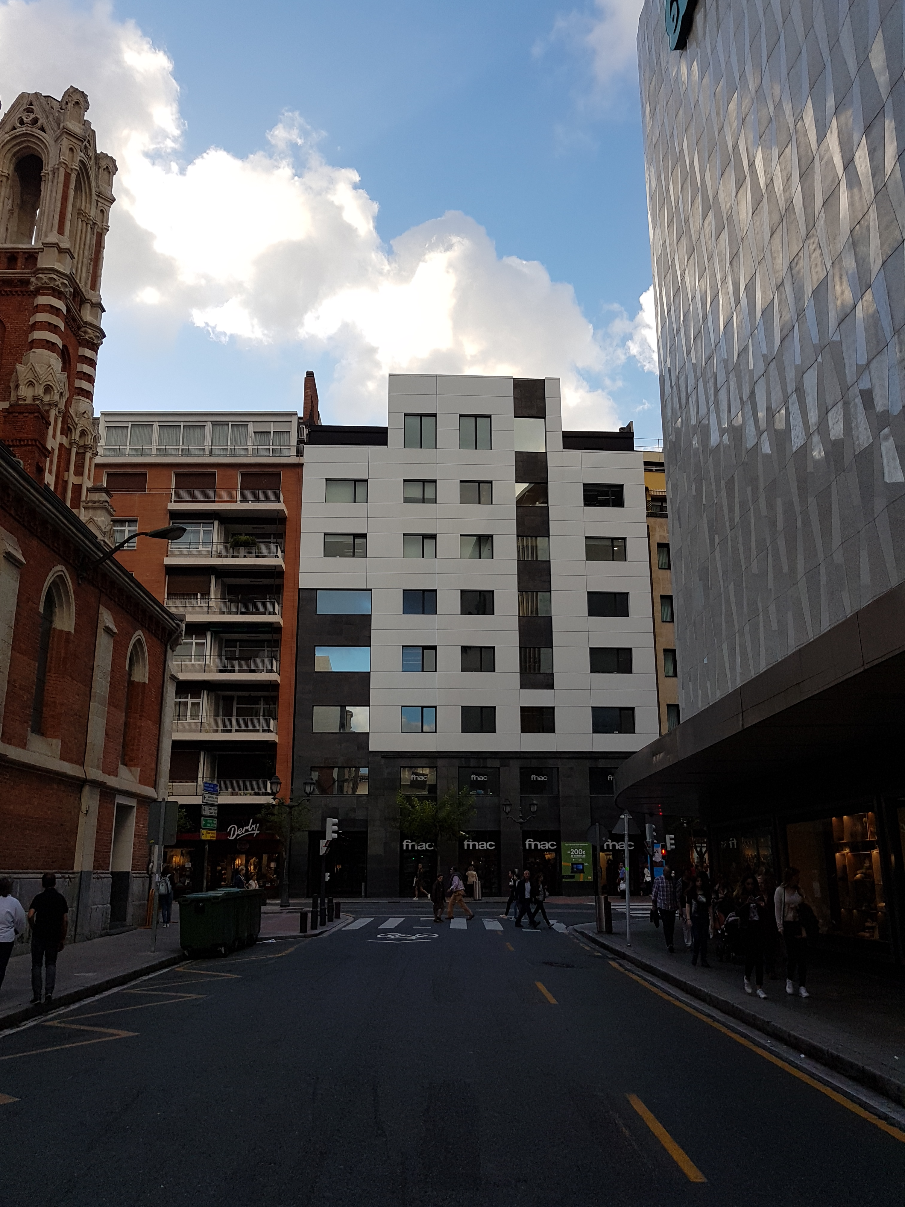 Calle del Canciller Ayala.